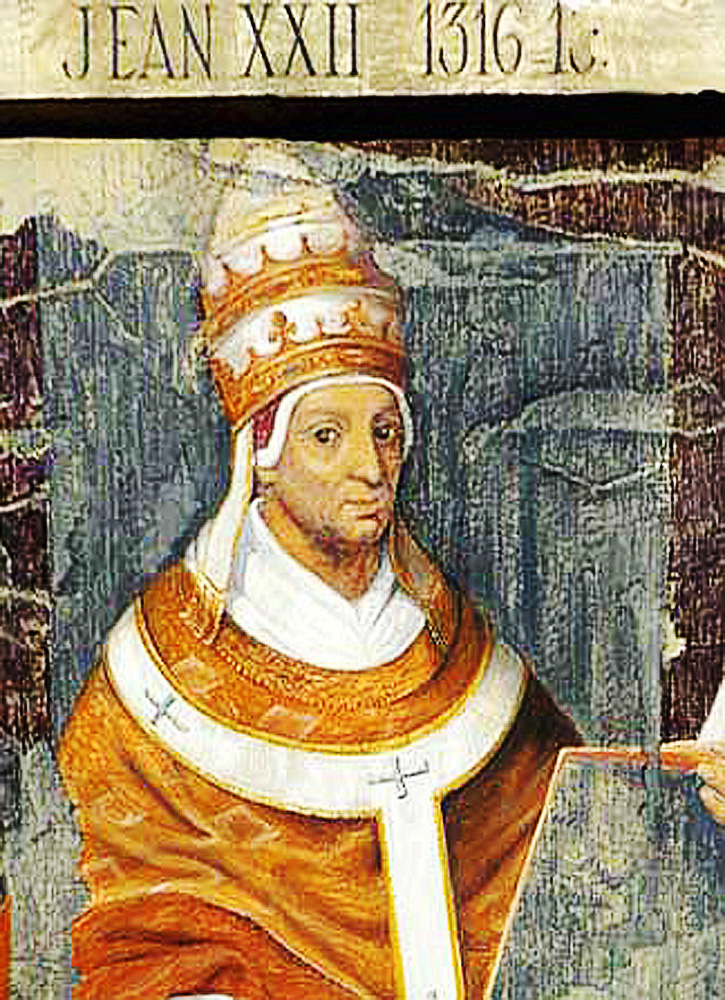 Miniature de Jean XXII en 1316